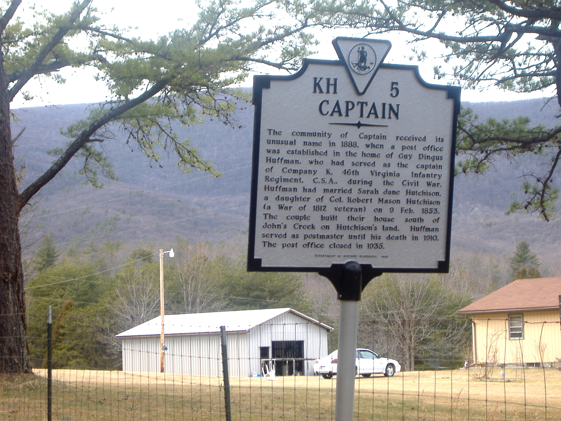 Captain, Virginia